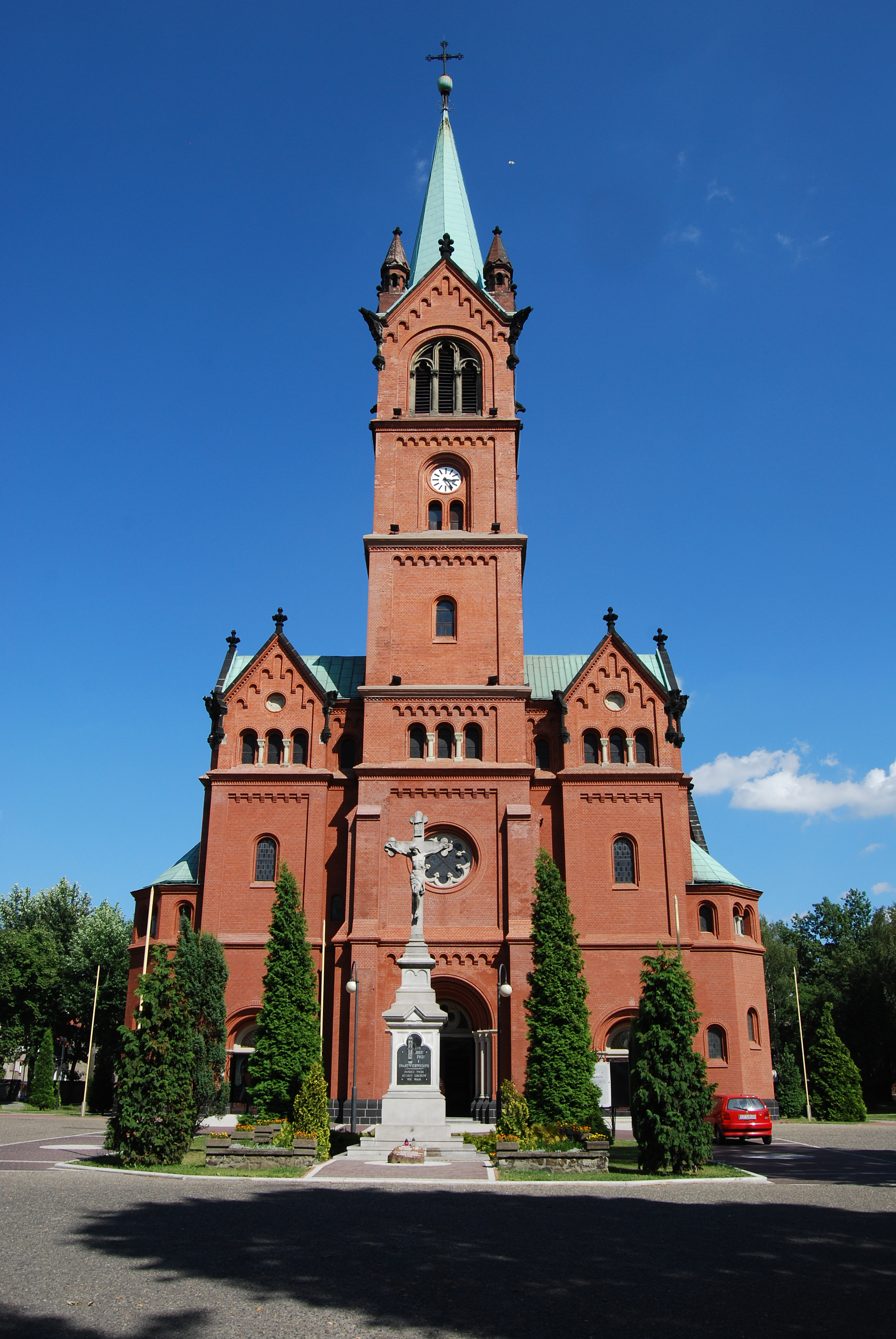 Zabrze, pl. Pieruszki - kościół św. Anny (zabytek nr A/320/10)